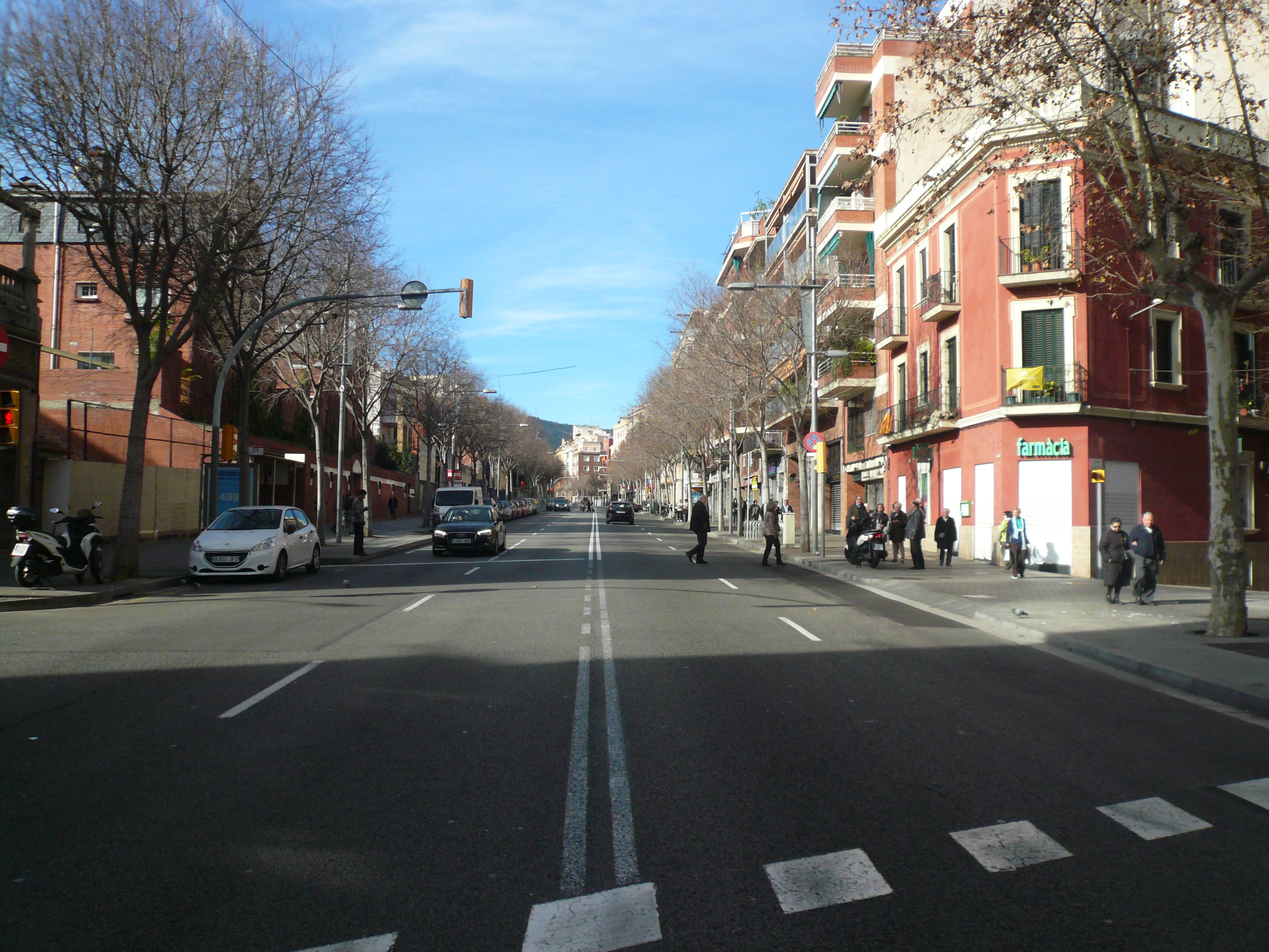 El passeig Maragall a l'altura del carrer Amílcar.